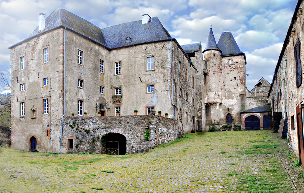 Innenhof der Unterburg der Burg Lissingen vom Fotografen Frank Martini